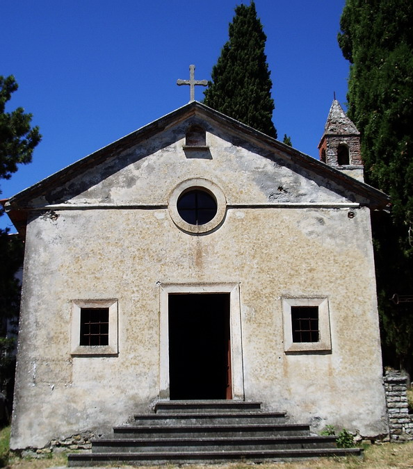 Cappella rurale di Montevitozzo (GR), foto 13/07/2007